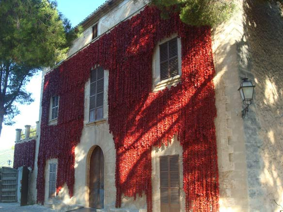 Fachada de la Fundación Pilar i Joan Miró cubierta con pimientos Tap de Cortí. Son Boter, Mallorca